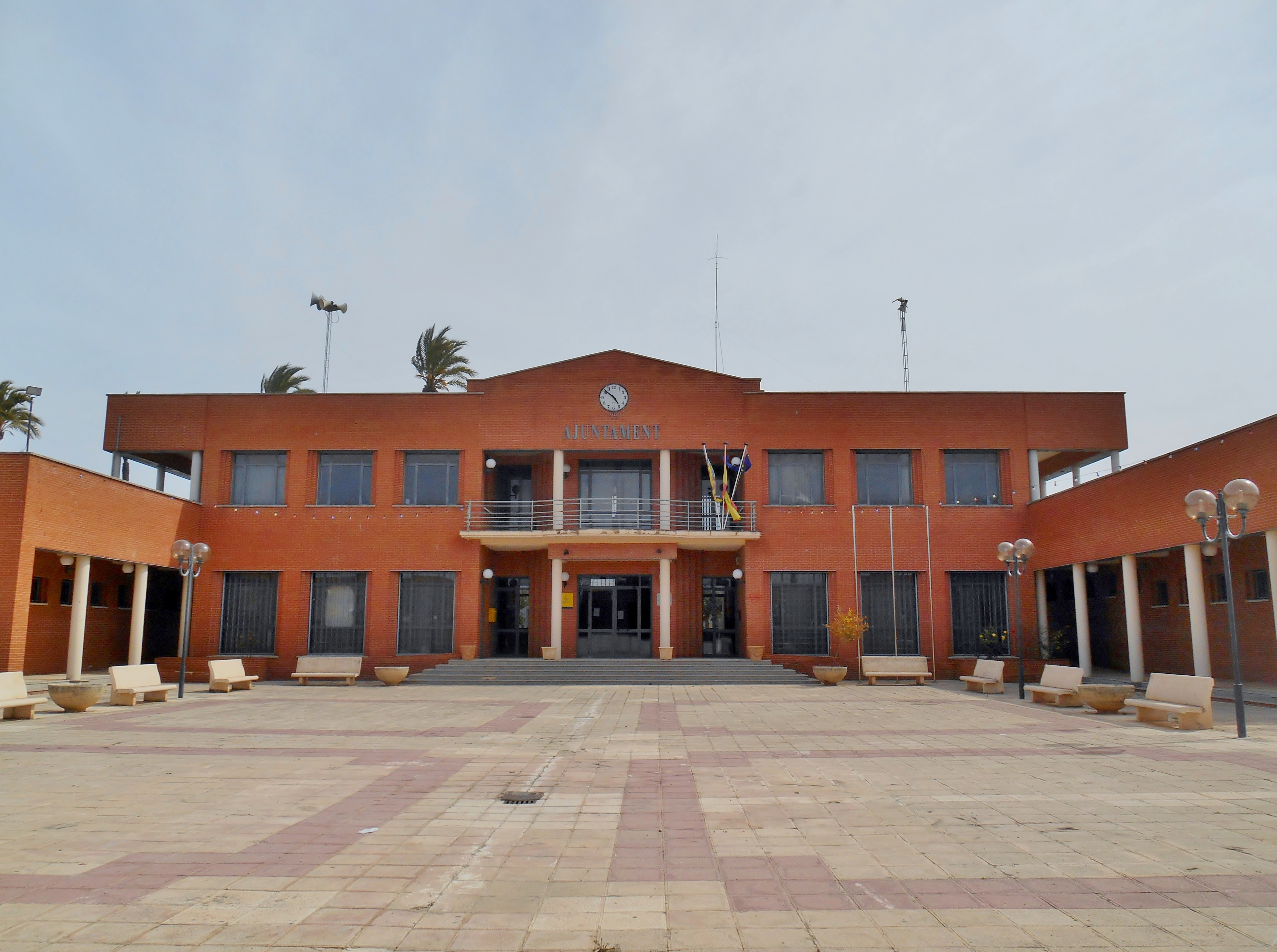 Beneixida nova.